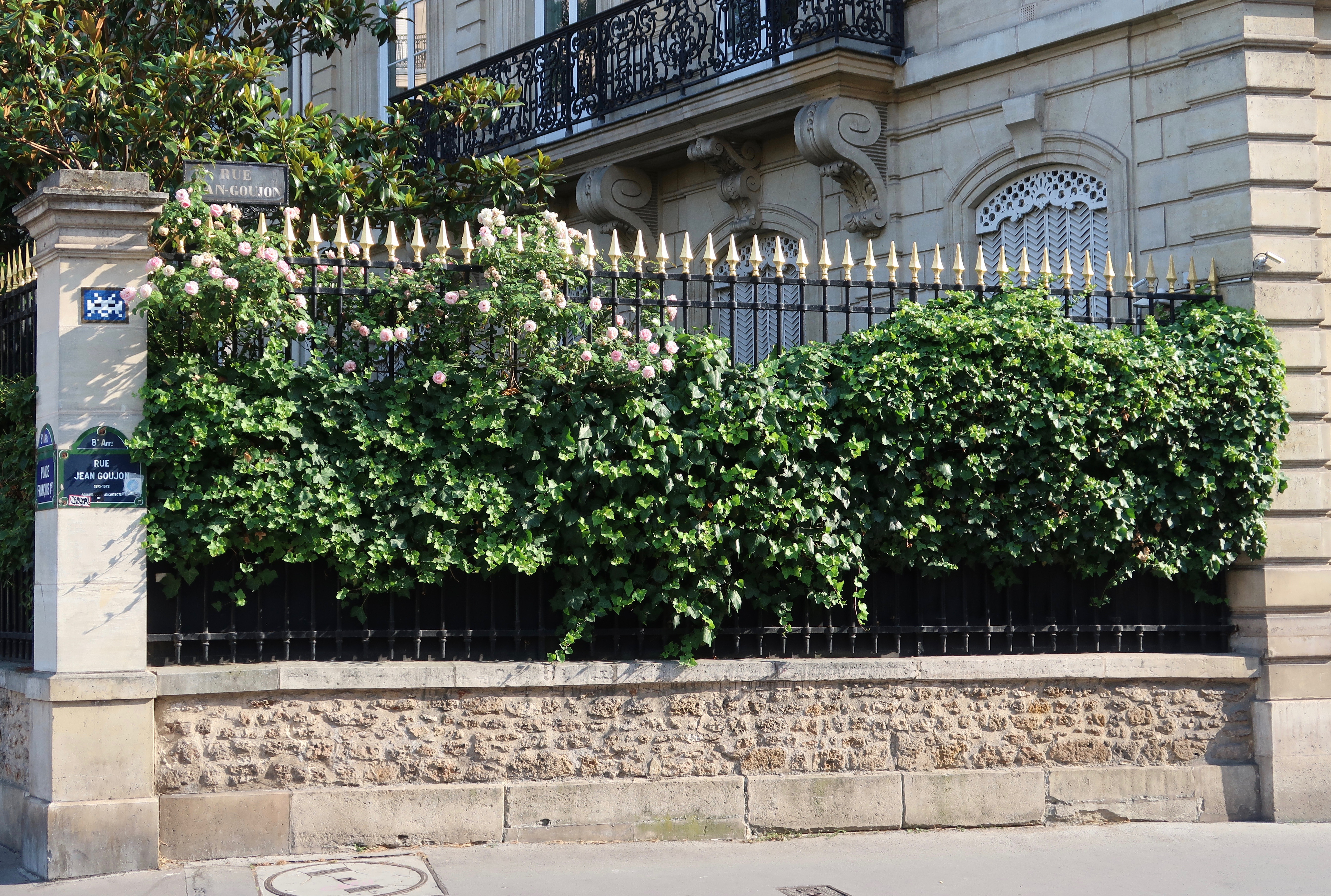 Rue Jean-Goujon (Paris, 8e).